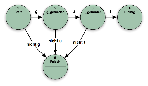 Beispiel eines EA, der als Parser arbeitet